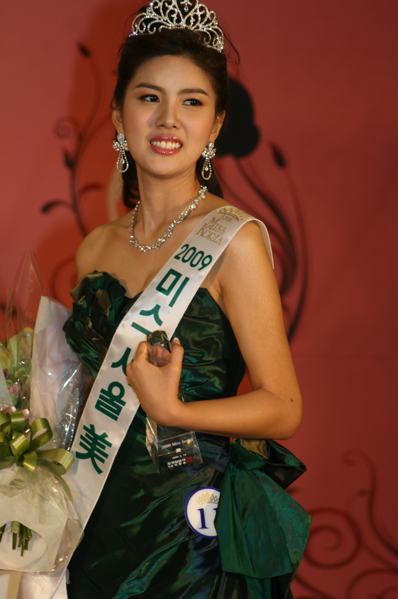 2009 미스코리아 서울 미 김은수